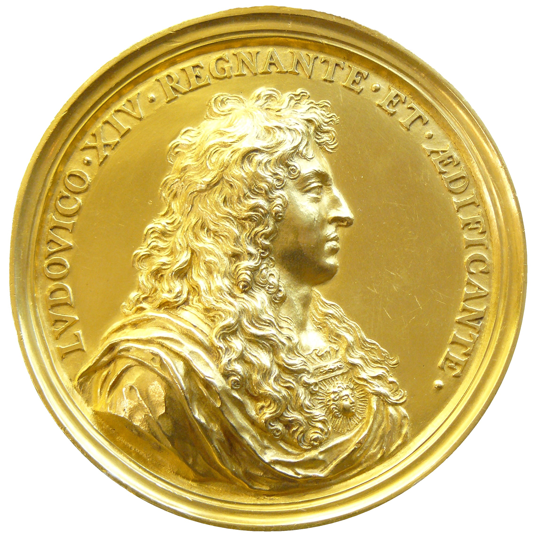 Louis XIV "Médaille du projet du Bernin pour la colonnade du Louvre" Paris, 1665, diam. environ 10 cm - Cabinet des Médailles n° 646A